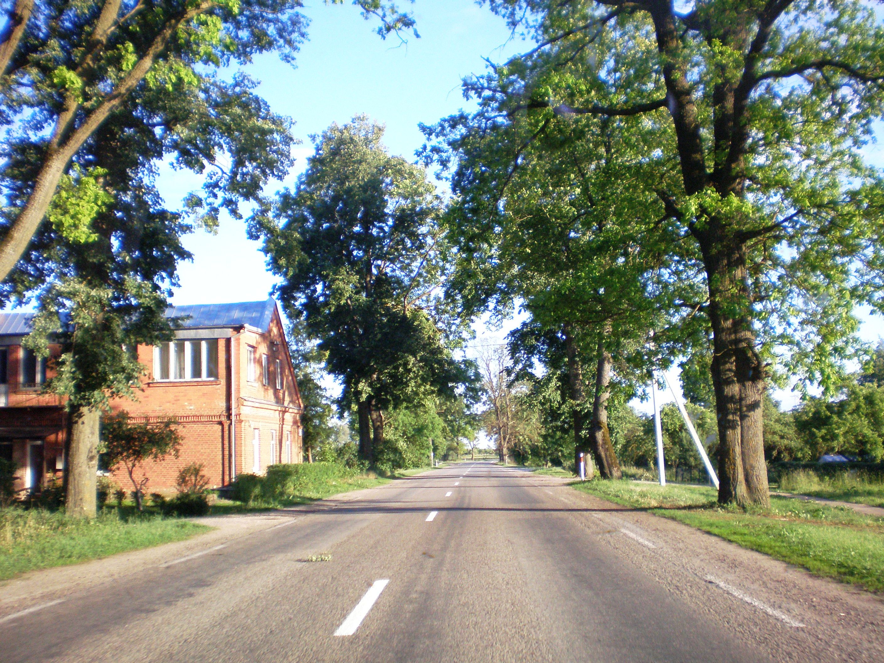 Klausučiai, Biržų raj.